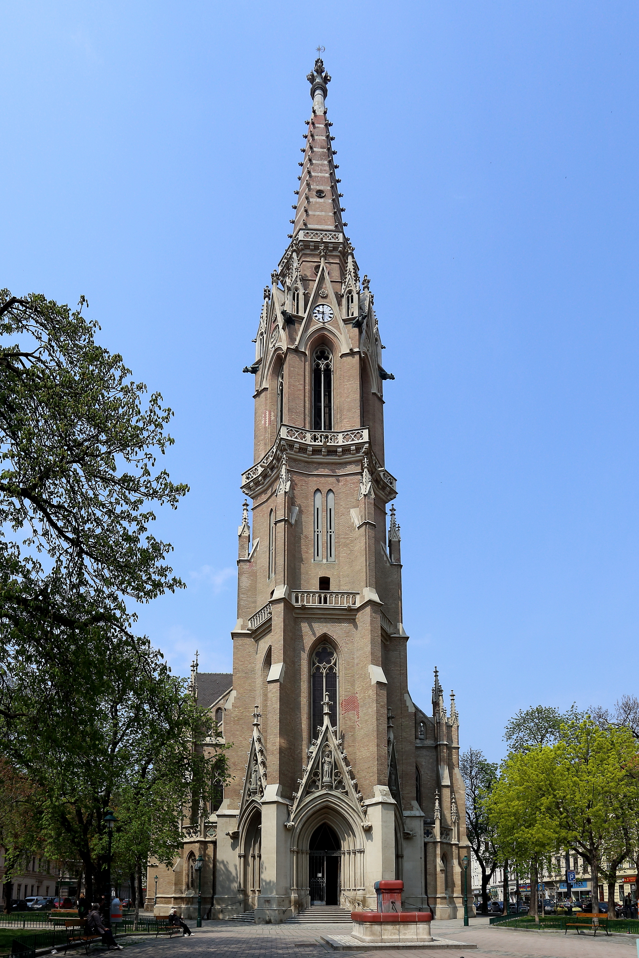 Die Othmarkirche im 3. Wiener Gemeindebezirk Landstraße.